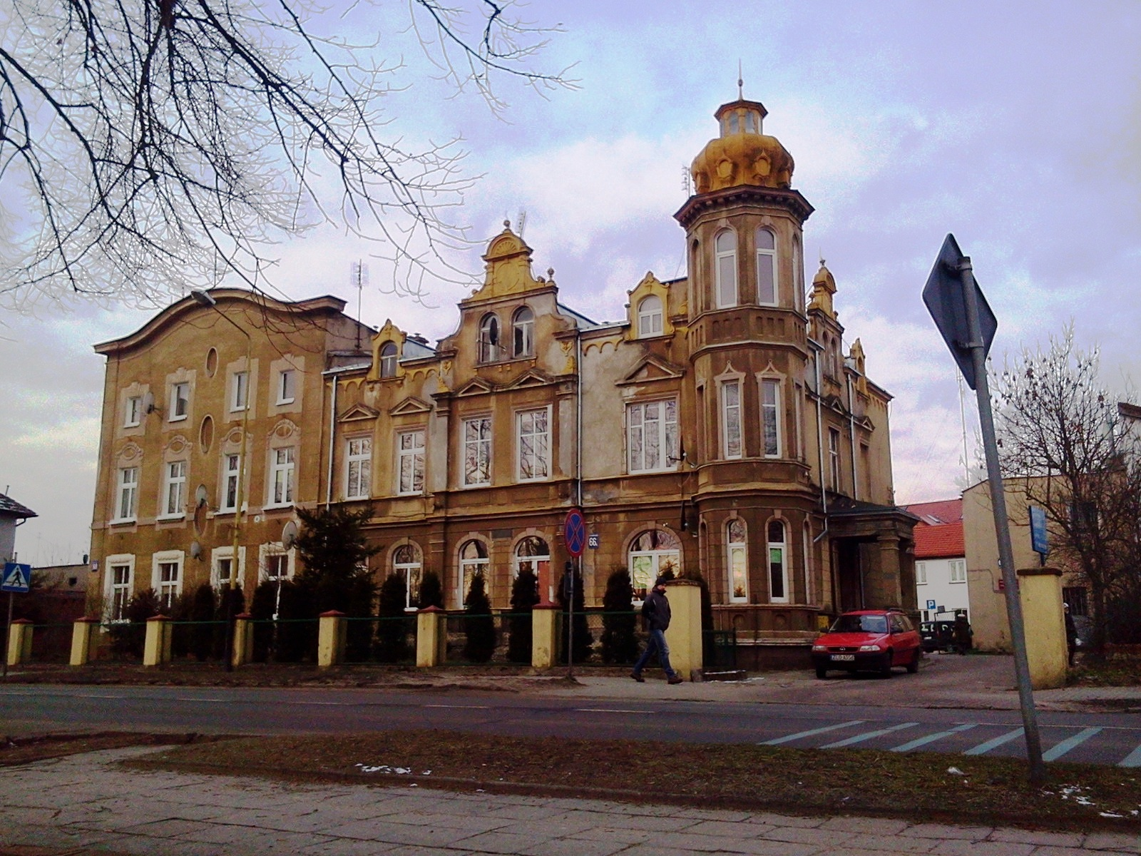 Kamienica w Łobzie (obok dworca PKP)